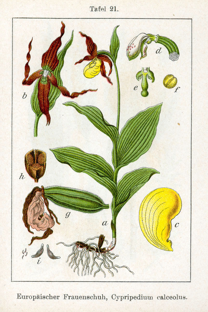 Cypripedium calceolus L. Original Description Europäischer Frauenschuh, Cypripedium calceolus